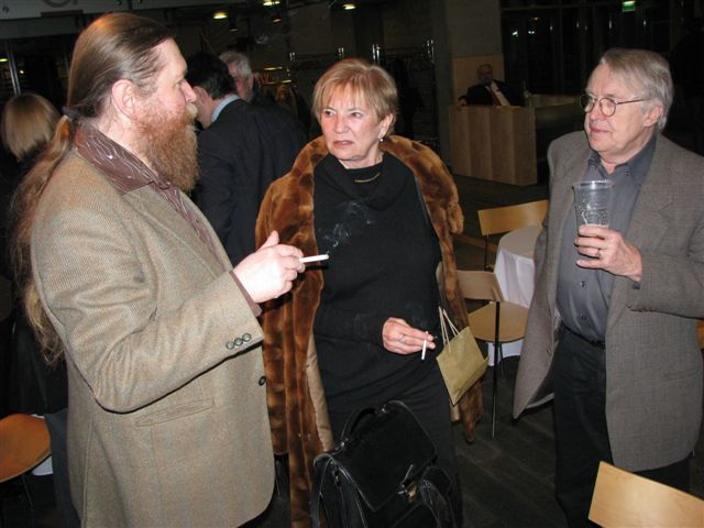 Pavel Kohout (b. 1928), Czech writer and his wife Jelena Mašínová (Czech writer), and Andrzej Jagodziński (b. 1954), Polish translator